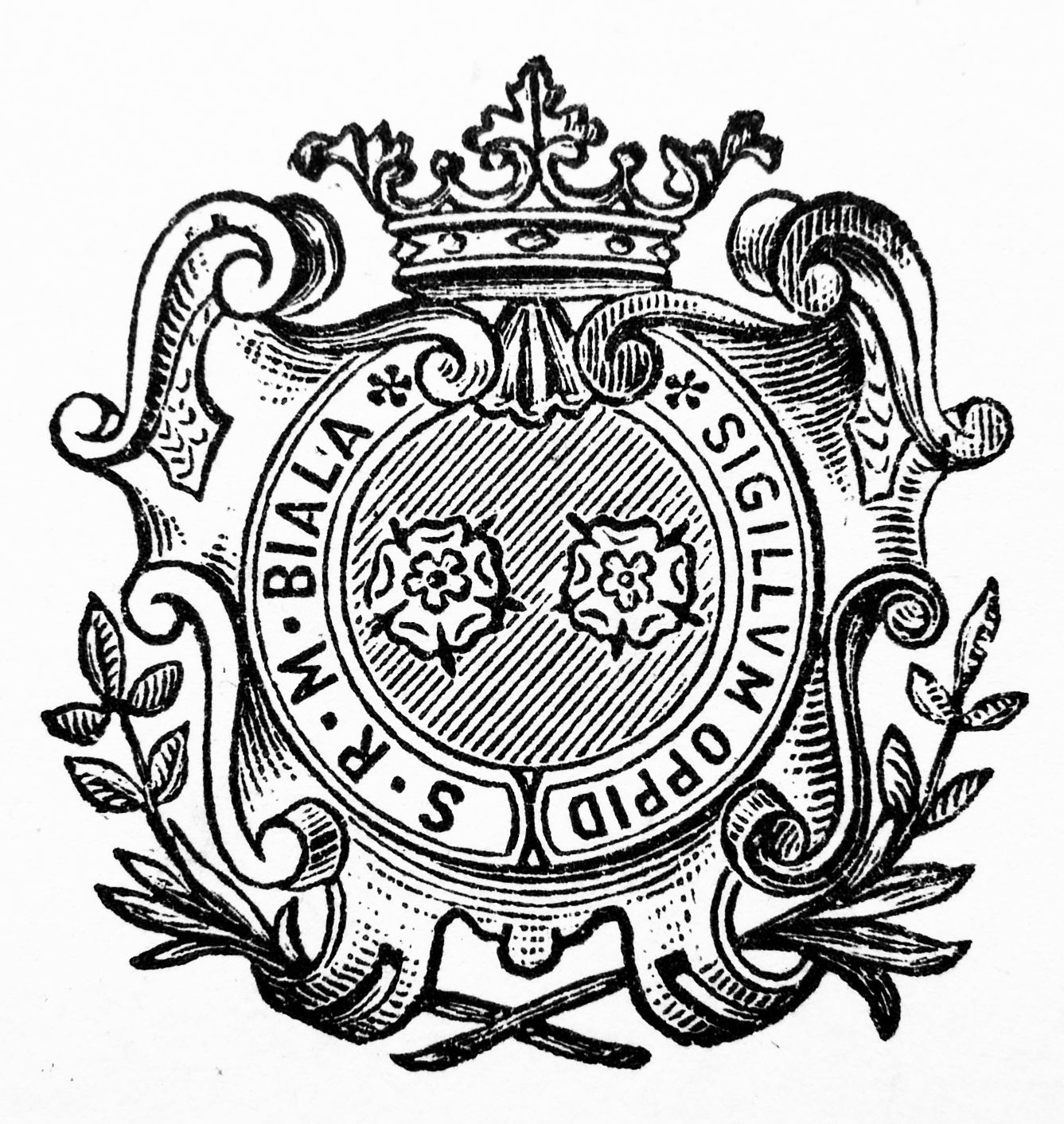 Herb Białej na dokumencie Sparkasse Biala 1914